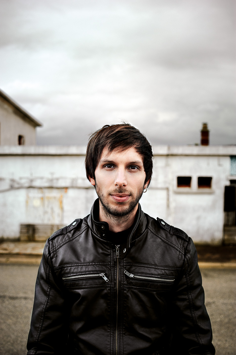 Photographie de Tony Paeleman